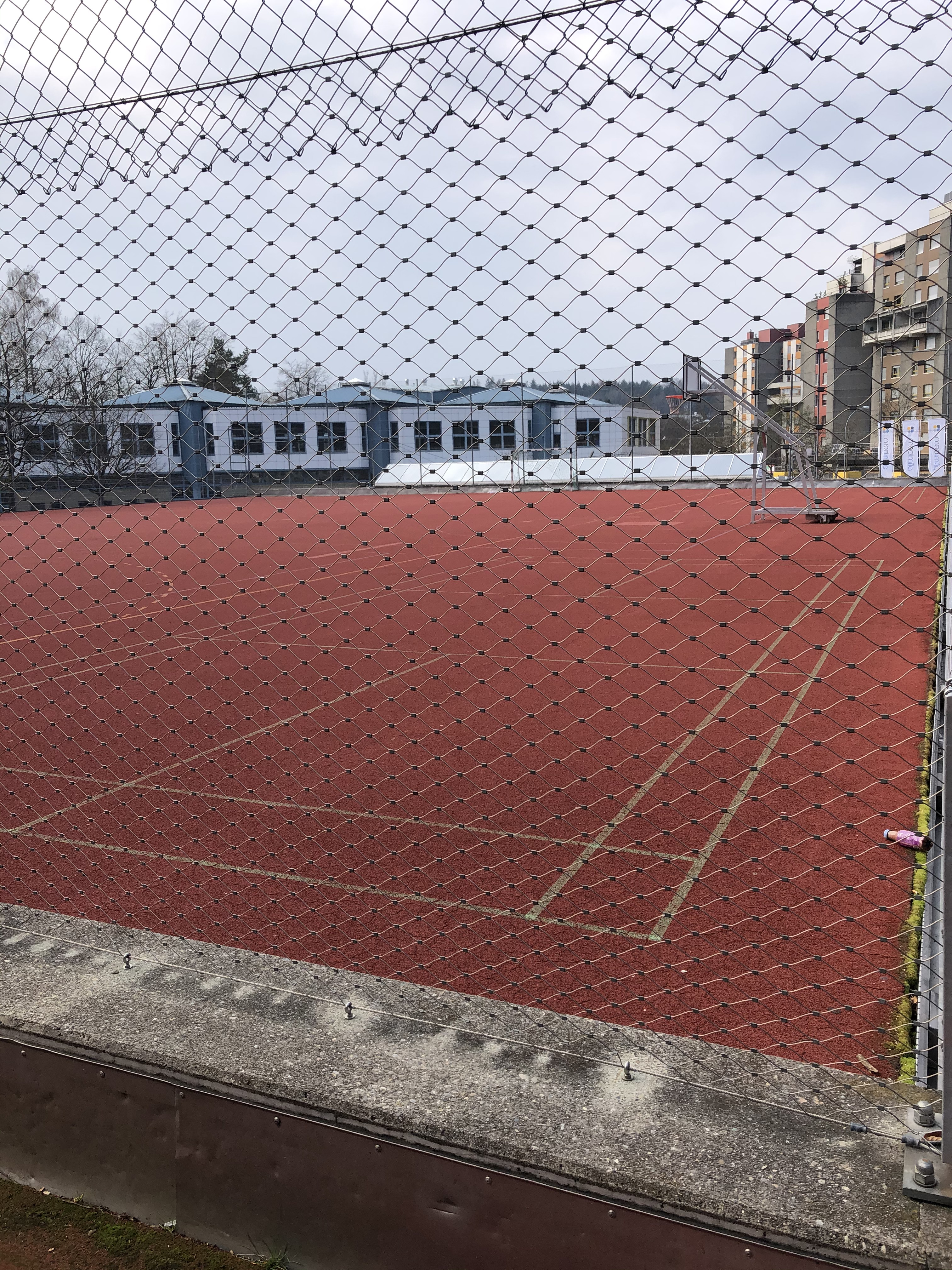 Holenacker Sportplatz